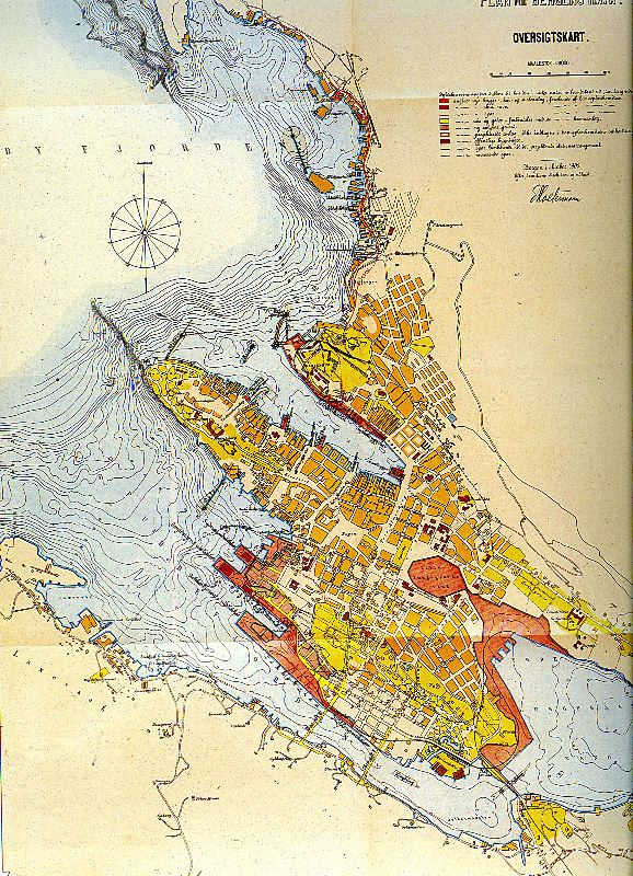 Puddefjorden: Kart over Bergen fra 1902. Bergen kommunes havneplan fra 1903. De rødlige områdene viser hvilke deler av Puddefjorden som allerede var bygget ut, eller var foreslått bygget ut. Tusen takk til Nina som har scannet kartet inn.